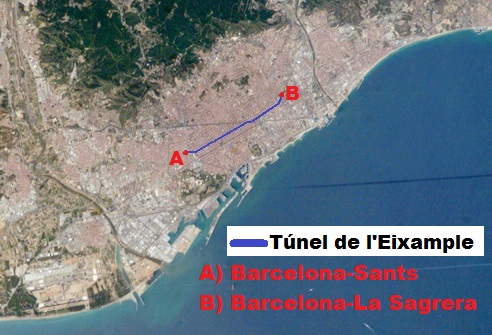 Túnel de l'Eixample